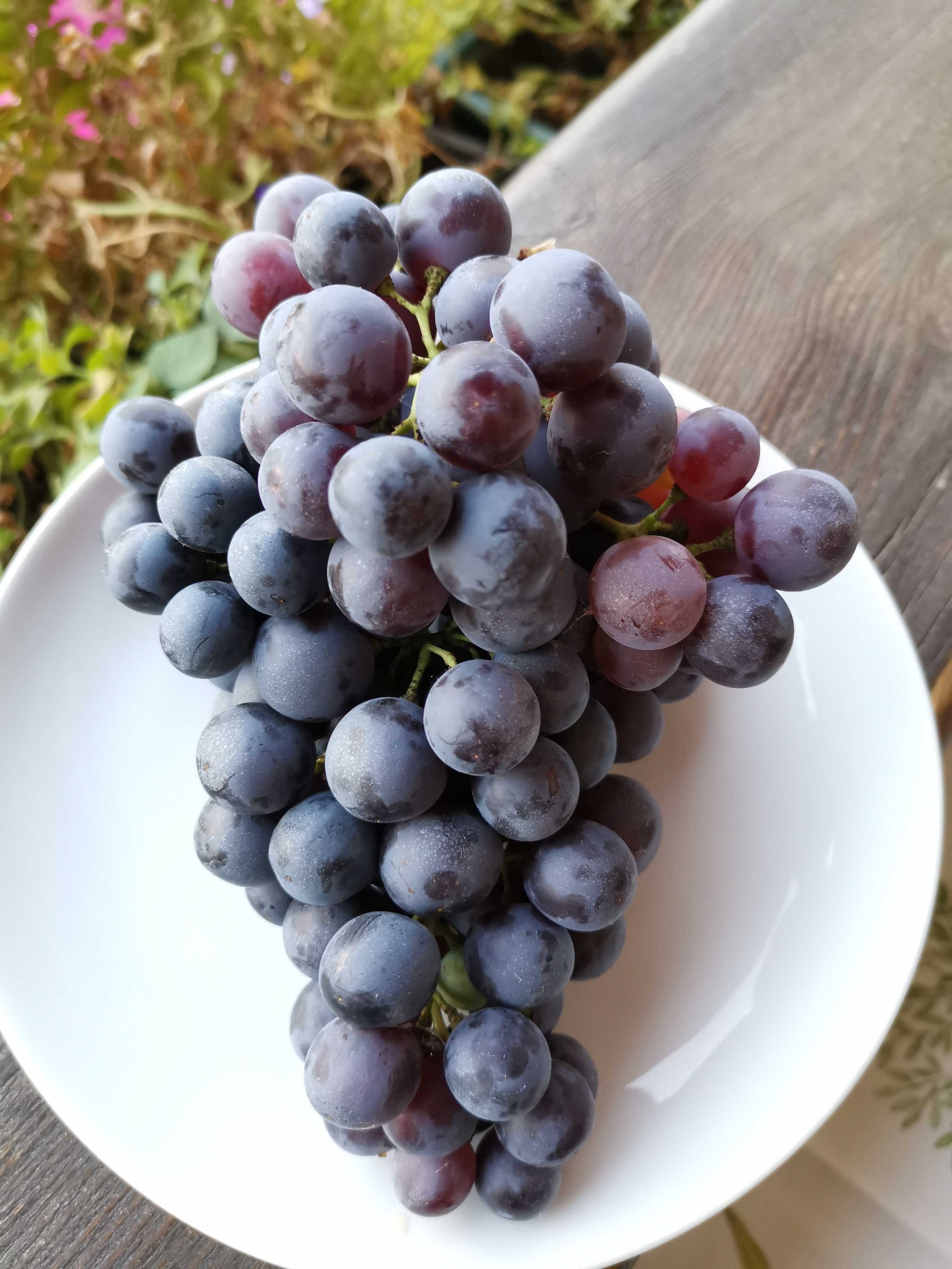 Rebe vom Vernatsch